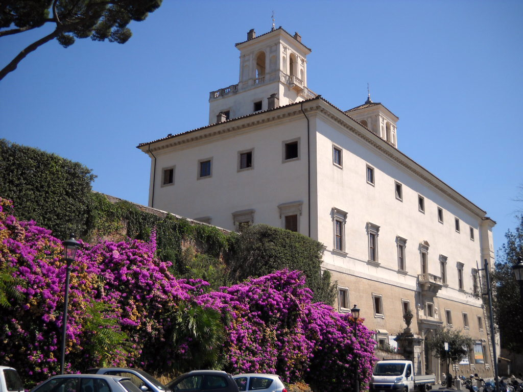 Villa Medici sede dell'Accademia di Francia